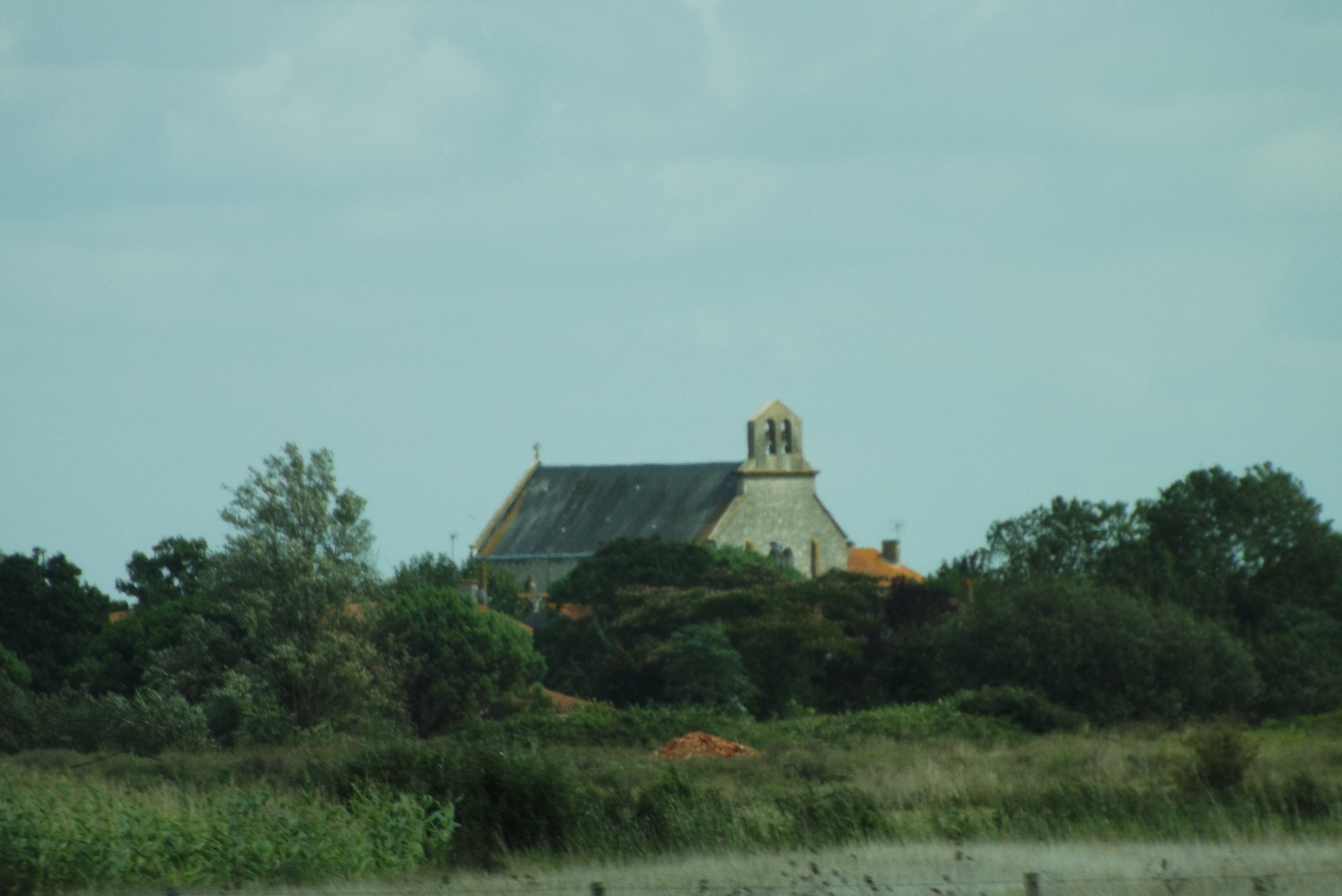 Eglise de Moreilles